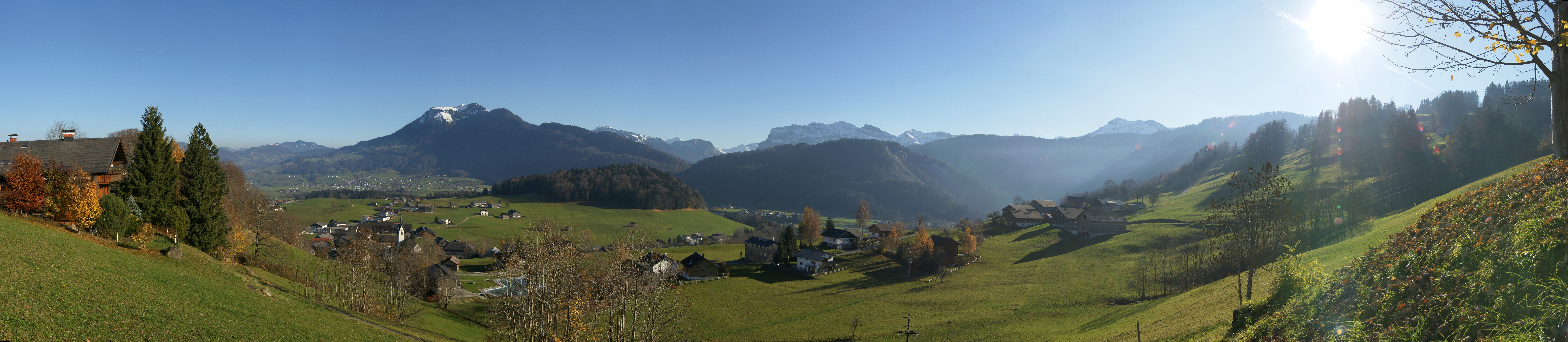 180° Bregenzwerwald Panorama von Oberbuchen mit Blick auf die Orte Schwarzenberg (Vorarlberg) vorne im Bild, Bersbuch rechts und Andelsbuch links. Die Berge von l.n.r.: Vordere Niedere und Baumgartenhöhe (sehr beliebt von Gleitschirmflieger;) Diedamskopf 2.090m, Üntschenspitze 2.135m im Gemeindegebiet von Schoppernau, Juppenspitze 2.412m und Mohnenfluh 2.542m in Schröcken sowie die Nordflanke der Kanisfluh 2.044m. Rechts die Hangspitze 1746m in Mellau